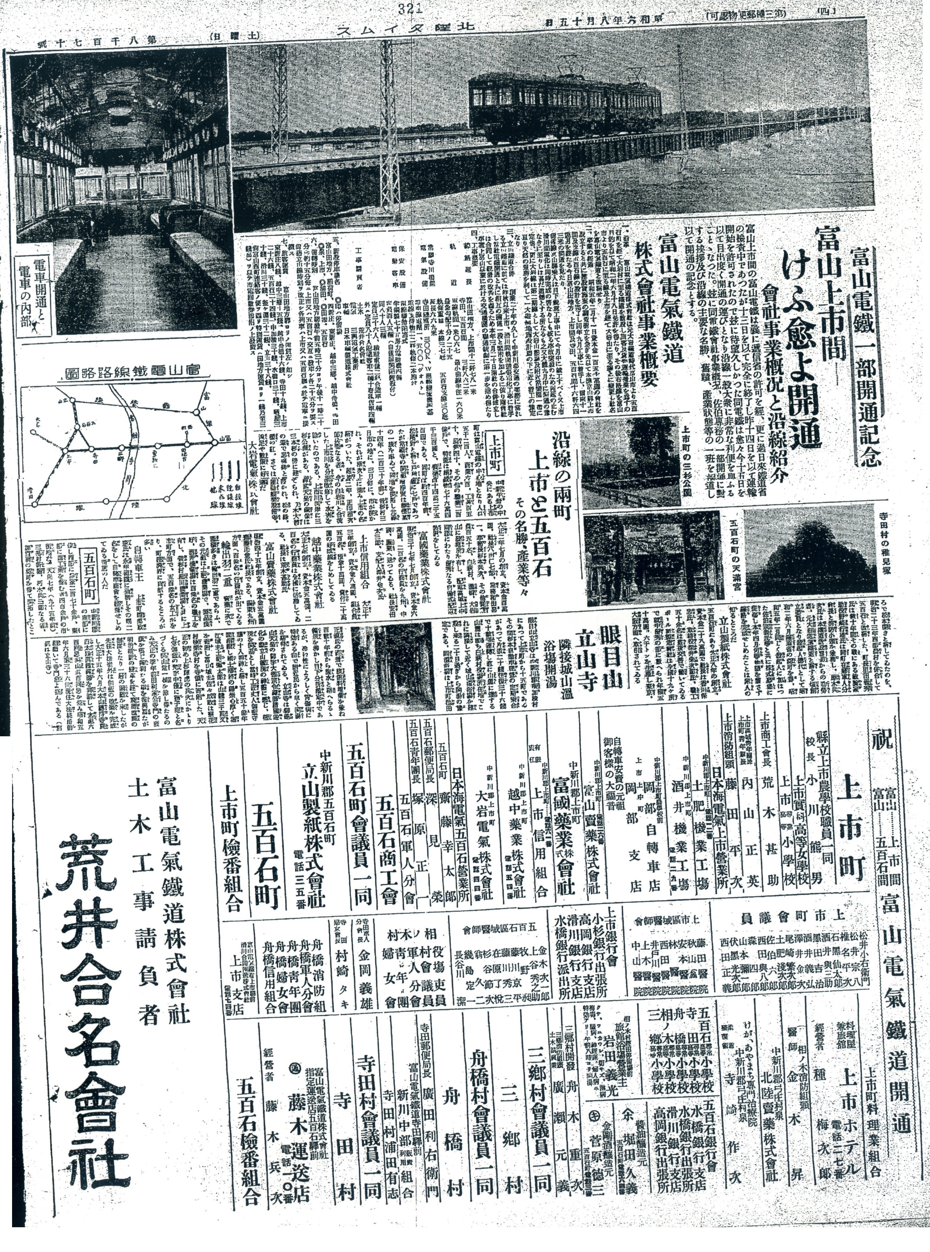 富山電鉄一部開通記念 富山上市間…けふ愈よ開通